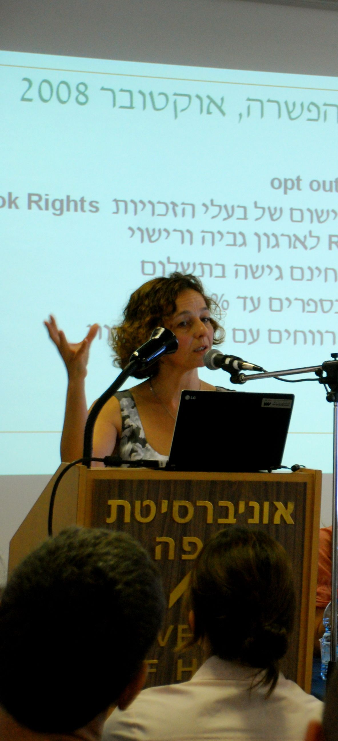 ניבה אלקין קורן בכנס שנת המשפט 2009, אוניברסיטת חיפה